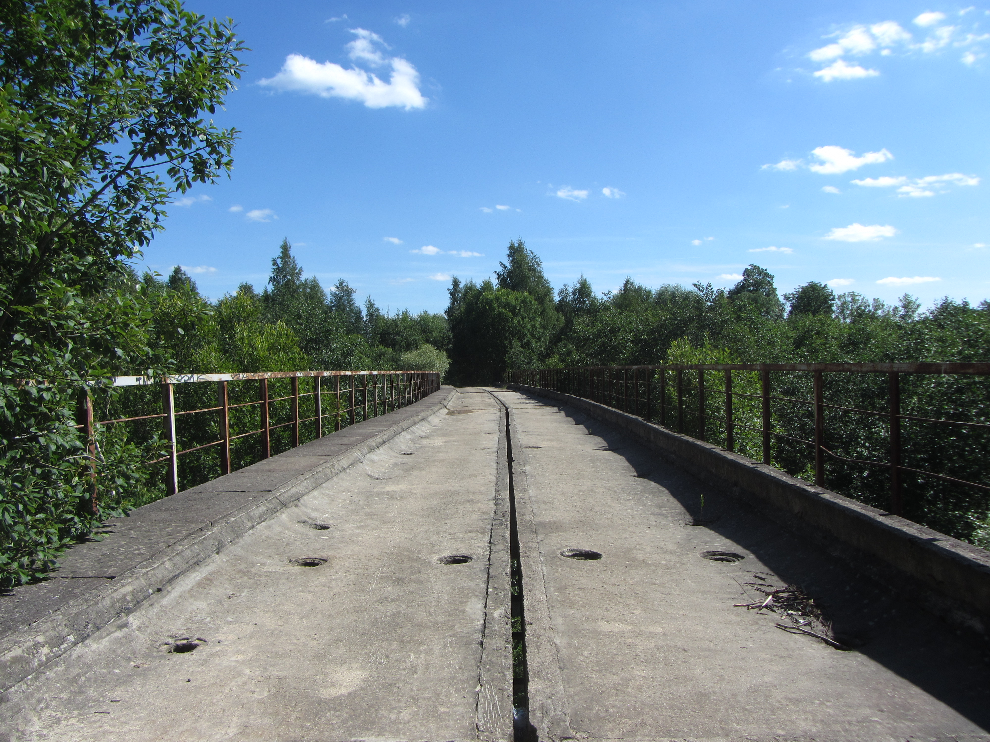 Leliūnų sen., Lithuania